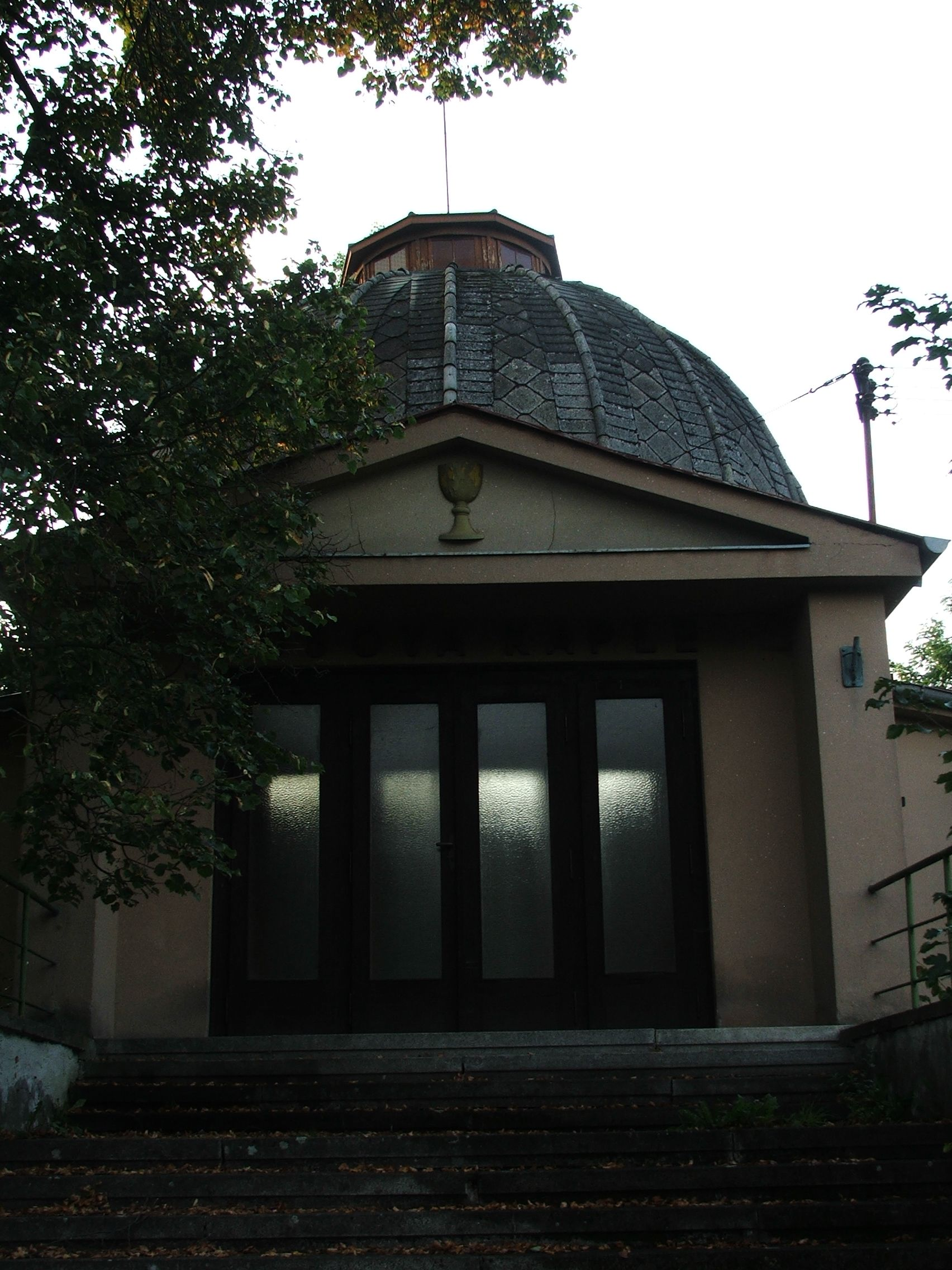 Husova kaple, jihozápadní okraj obce, Dolní Bělá.